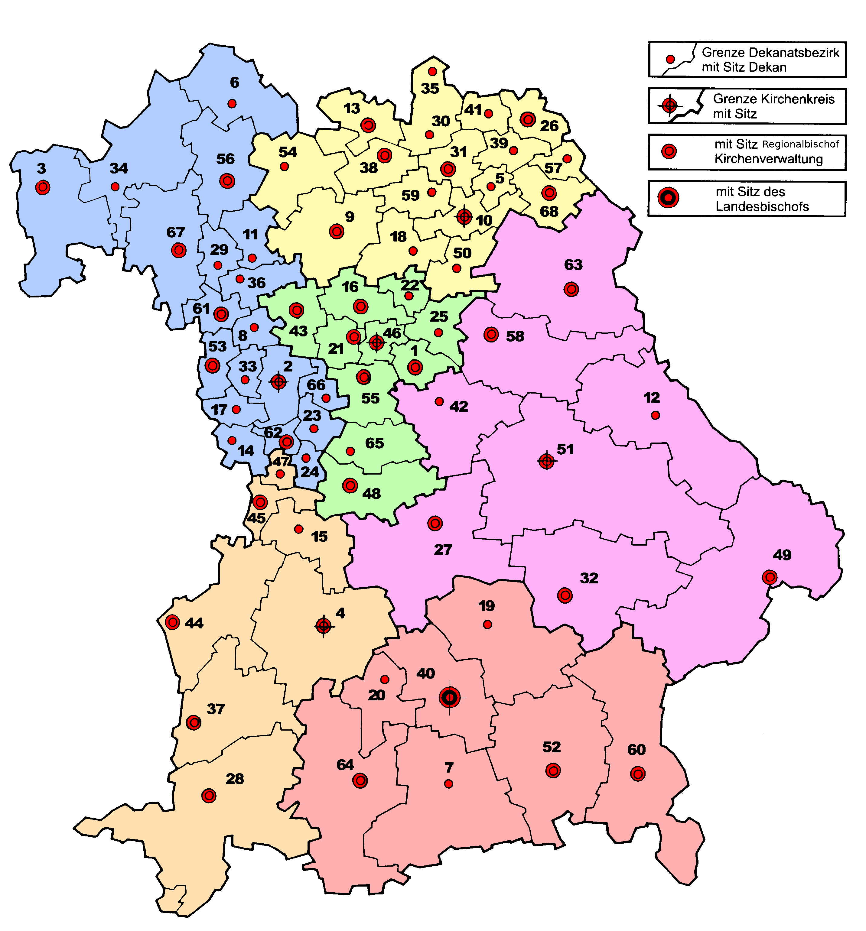 Dekanatsbezirke der Evangelisch-Lutherischen Kirche in Bayern 1 Altdorf, 2 Ansbach, 3 Aschaffenburg, 4 Augsburg, 5 Bad Berneck, 6 Bad Neustadt/Saale, 7 Bad Tölz, 8 Bad Windsheim, 9 Bamberg, 10 Bayreuth, 11 Castell, 12 Cham, 13 Coburg, 14 Dinkelsbühl, 15 Donauwörth, 16 Erlangen, 17 Feuchtwangen, 18 Forchheim (Sitz Muggendorf), 19 Freising, 20 Fürstenfeldbruck, 21 Fürth, 22 Gräfenberg, 23 Gunzenhausen, 24 Heidenheim, 25 Hersbruck, 26 Hof, 27 Ingolstadt, 28 Kempten, 29 Kitzingen, 30 Kronach-Ludwigsstadt (seit 2010), 31 Kulmbach, 32 Landshut, 33 Leutershausen, 34 Lohr a. Main, 35 Kronach-Ludwigsstadt (seit 2010), 36 Markt Einersheim, 37 Memmingen, 38 Michelau, 39 Münchberg, 40 München, 41 Naila, 42 Neumarkt, 43 Neustadt a.d.Aisch, 44 Neu-Ulm, 45 Nördlingen, 46 Nürnberg, 47 Oettingen, 48 Pappenheim, 49 Passau, 50 Pegnitz, 51 Regensburg, 52 Rosenheim, 53 Rothenburg o.d. Tauber, 54 Rügheim, 55 Schwabach, 56 Schweinfurt, 57 Selb, 58 Sulzbach-Rosenberg, 59 Thurnau, 60 Traunstein, 61 Uffenheim, 62 Wassertrüdingen, 63 Weiden, 64 Weilheim, 65 Weißenburg, 66 Windsbach, 67 Würzburg, 68 Wunsiedel